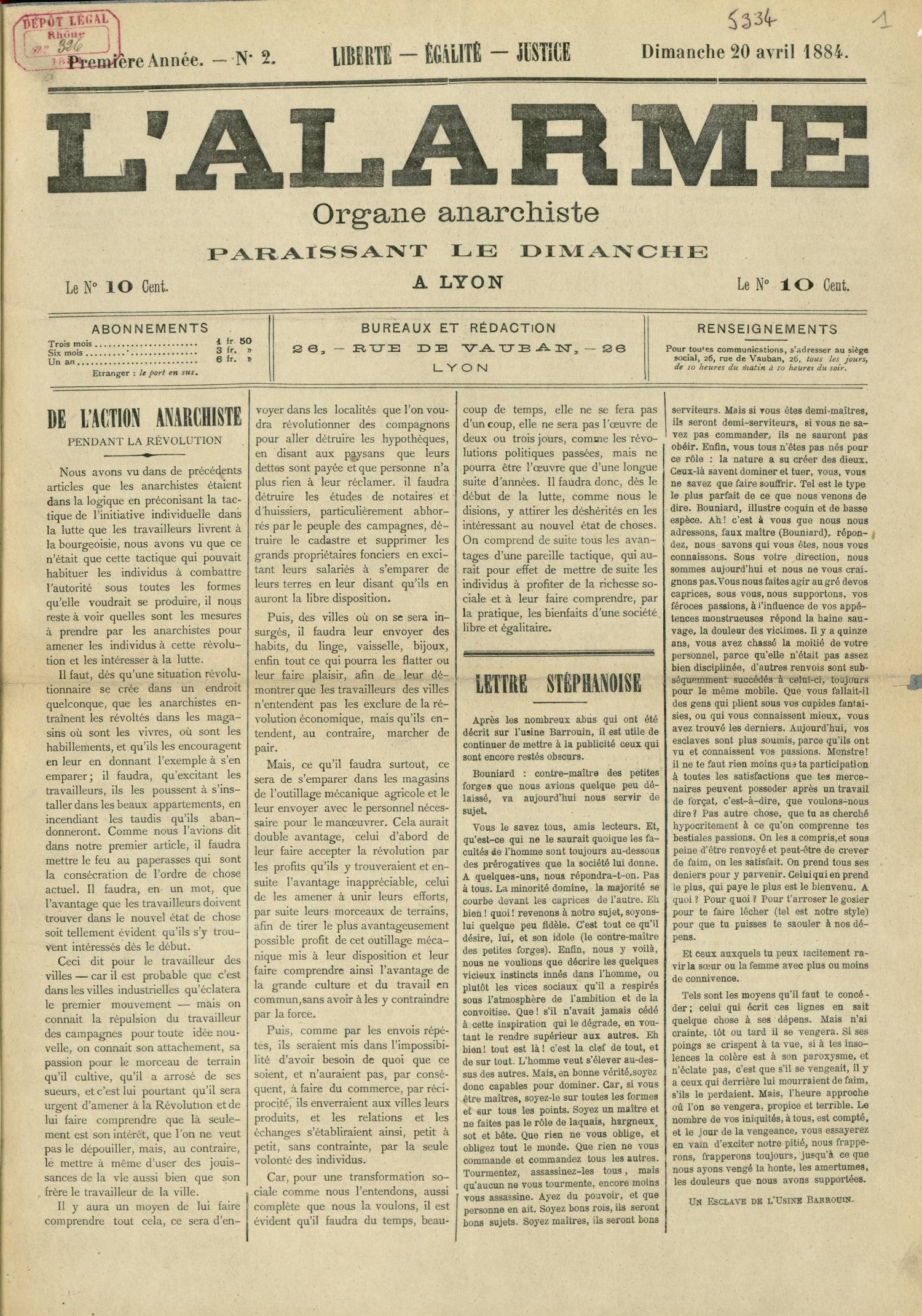 L’Alarme, organe anarchiste : 8 numéros publiés entre avril et juin 1884.